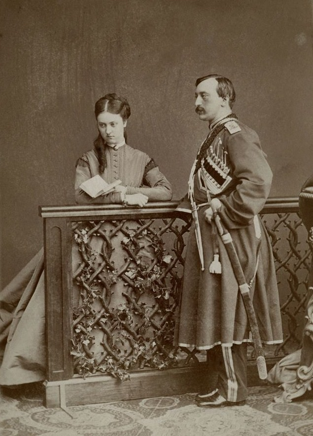 Сергей Алексеевич Шереметев с будущей женой княжно Евдокией Борисовной Голицыной.